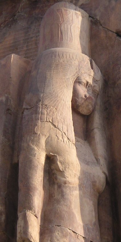 Colosses de Memnon : Détail d'une des statues colossales de Tiyi - Règne d'Amenhotep III - XVIIIe dynastie égyptienne - Kom el-Hettan - août 2005